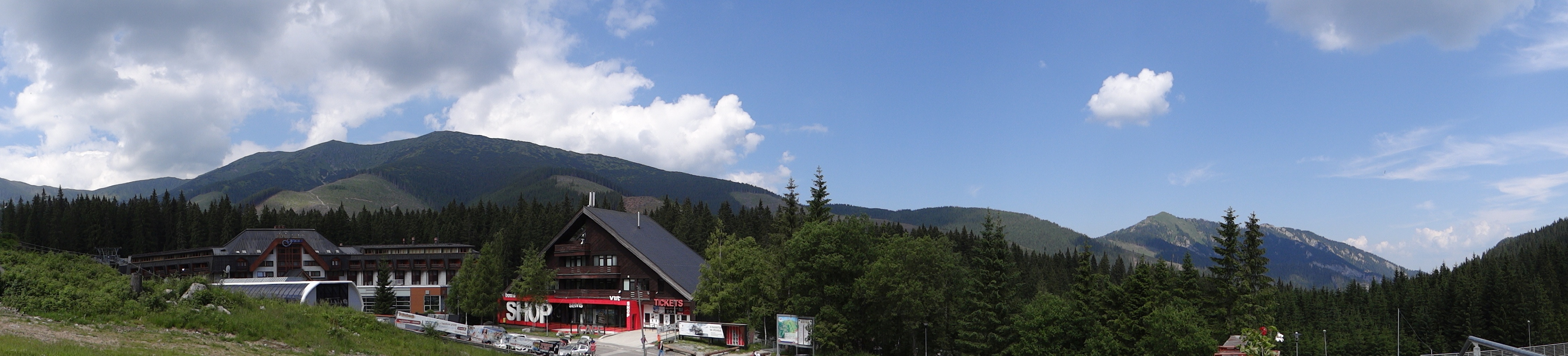 Biela Púť